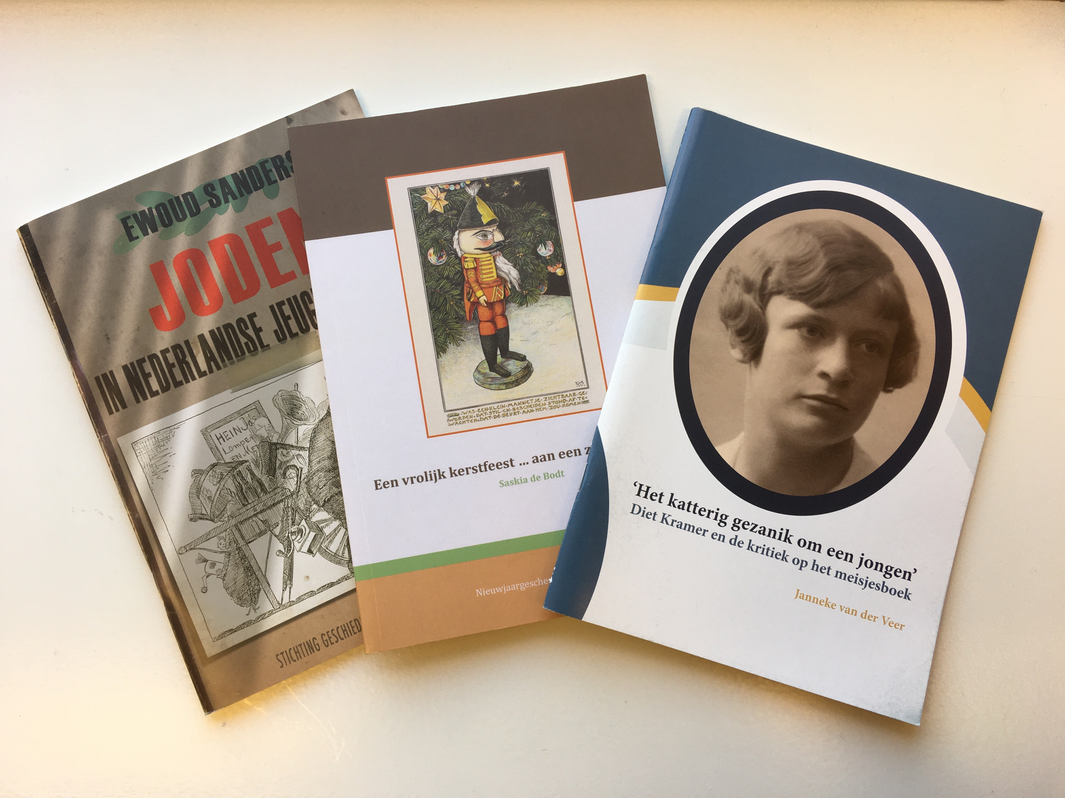 Uitgaven in de reeks 'De waare rijkdom'